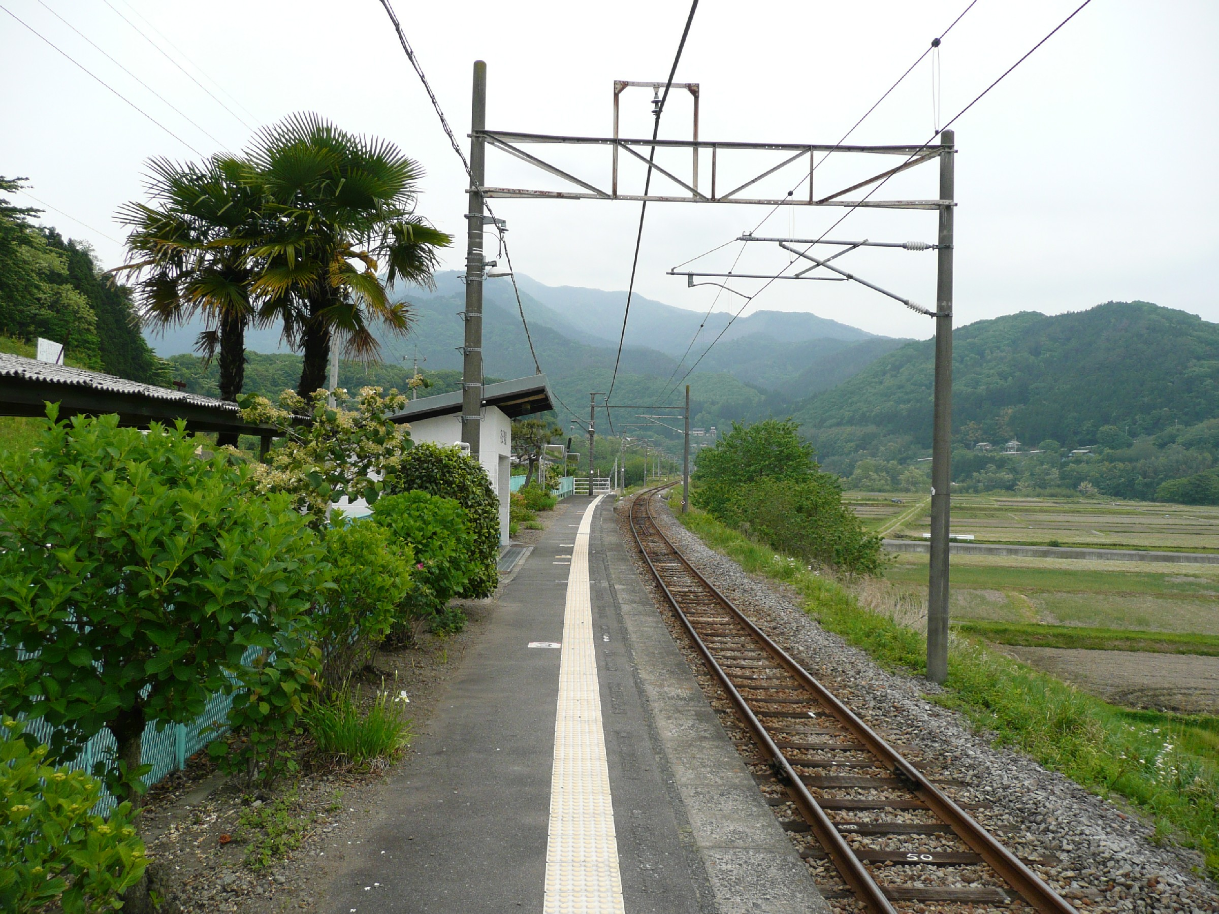 祖母島駅ホーム